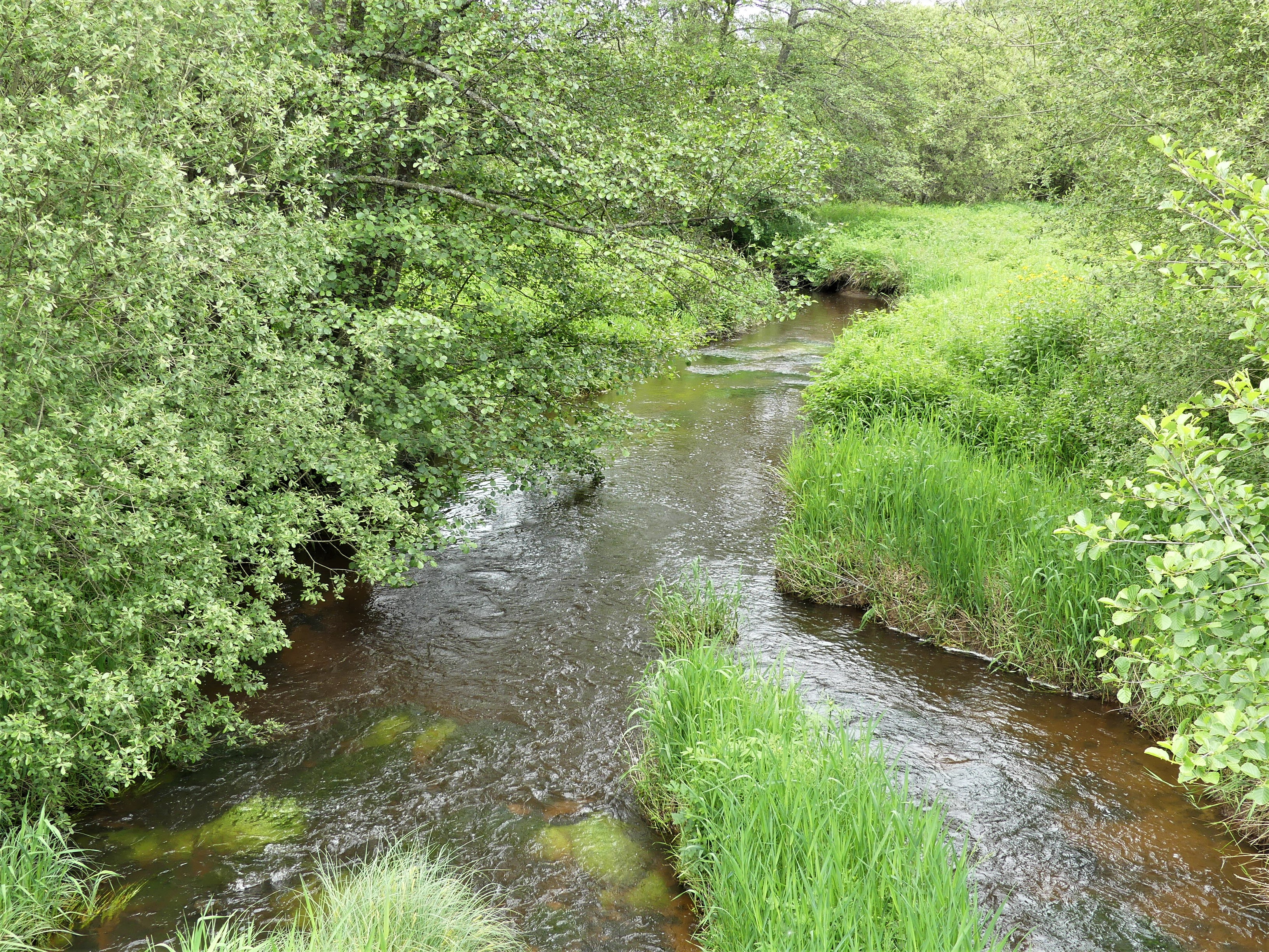 La Méouzette au pont près du lieu-dit Ganne Courtioux, Saint-Merd-la-Breuille, Creuse, France. Vue prise en direction de l'amont.